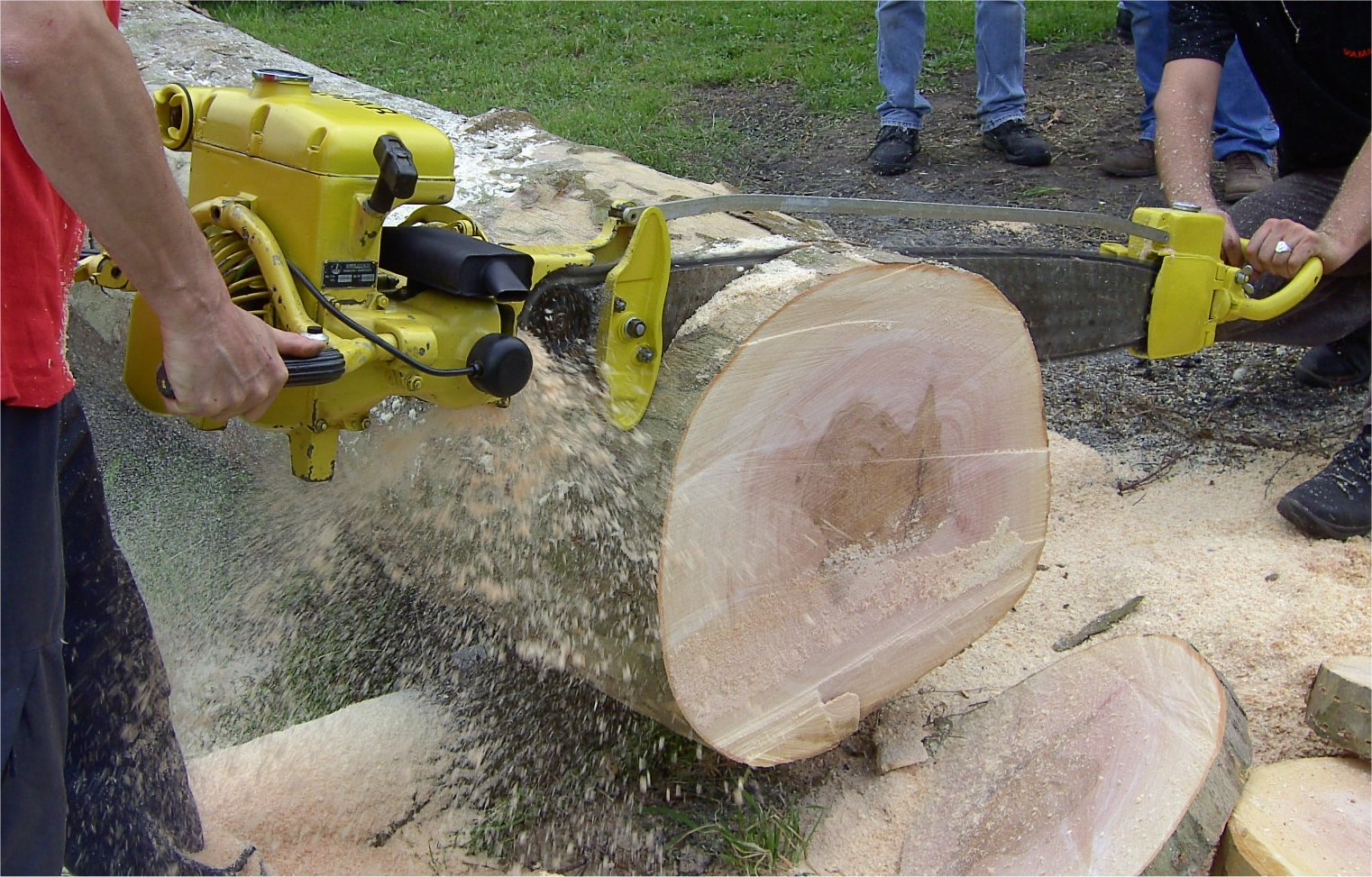 Dolmar-CV 2 Zylinder, 8,5PS